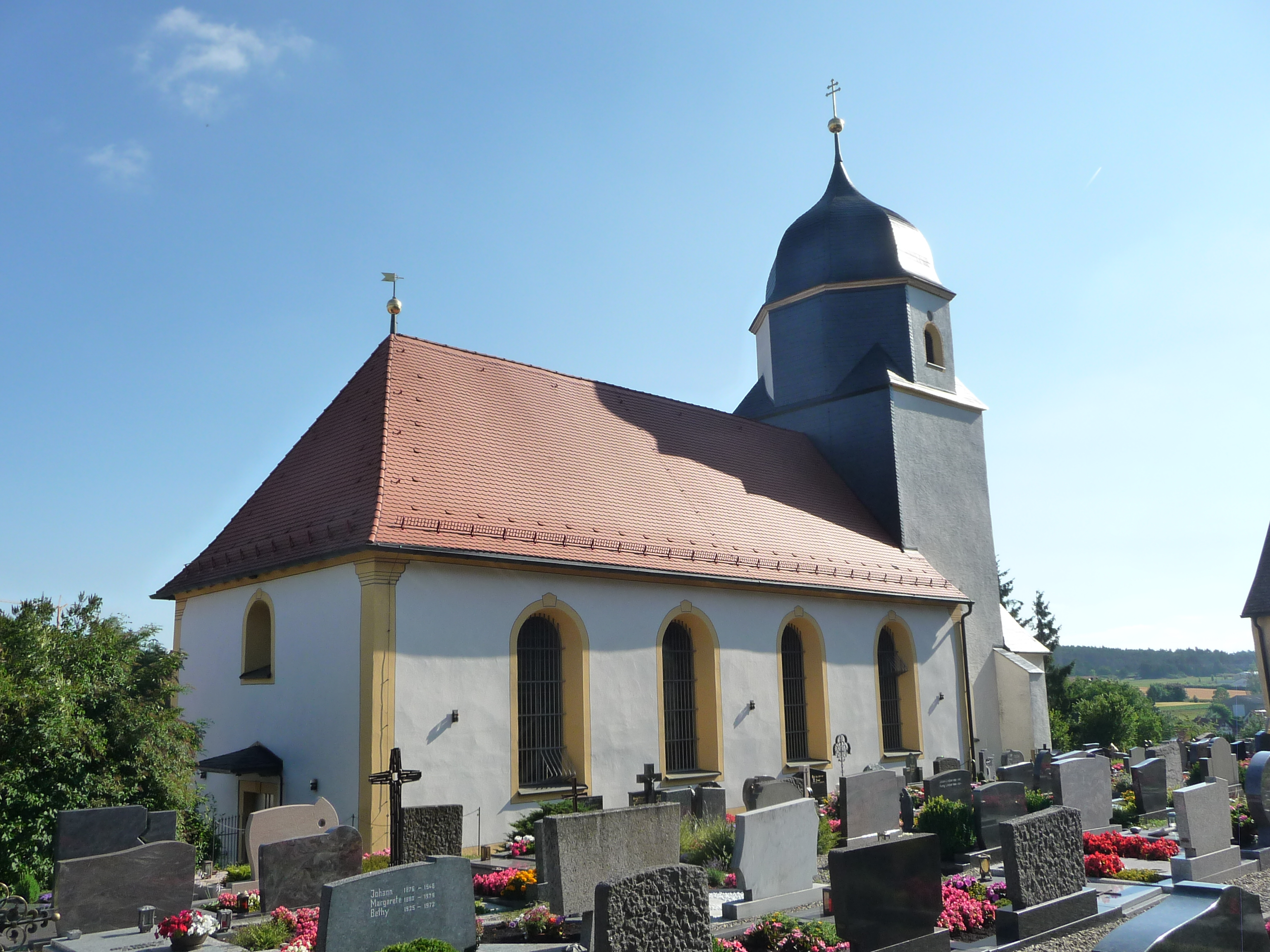 katholische Pfarrkirche St. Jakobus und Katharina in Königsfeld, Oberfranken